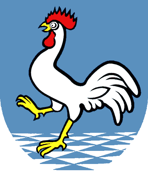 Herb Grodziecka w powiecie bielskim, gminie Jasienica